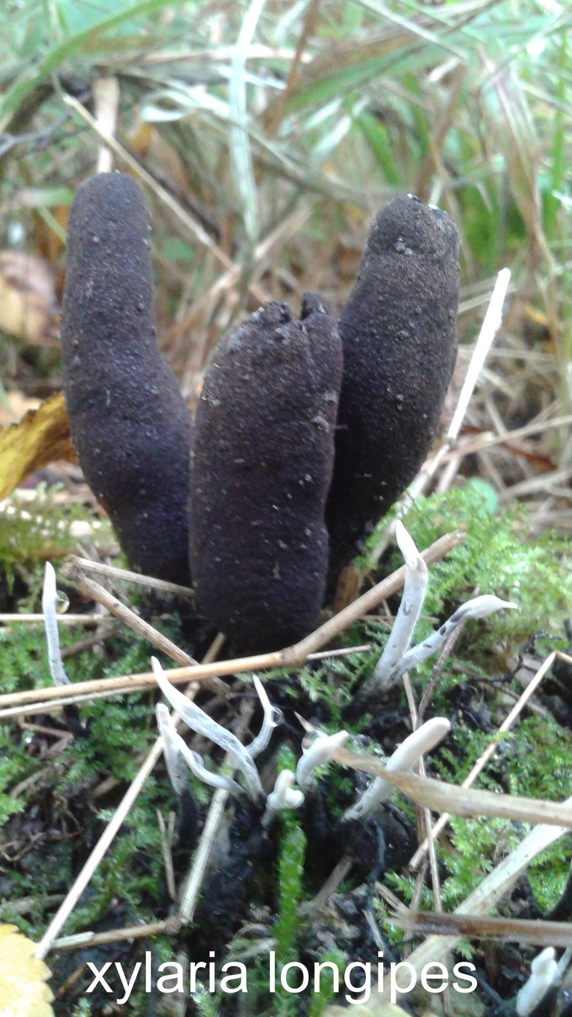 Xylaria longipe + xylaria hypoxylon du nord pas de calais